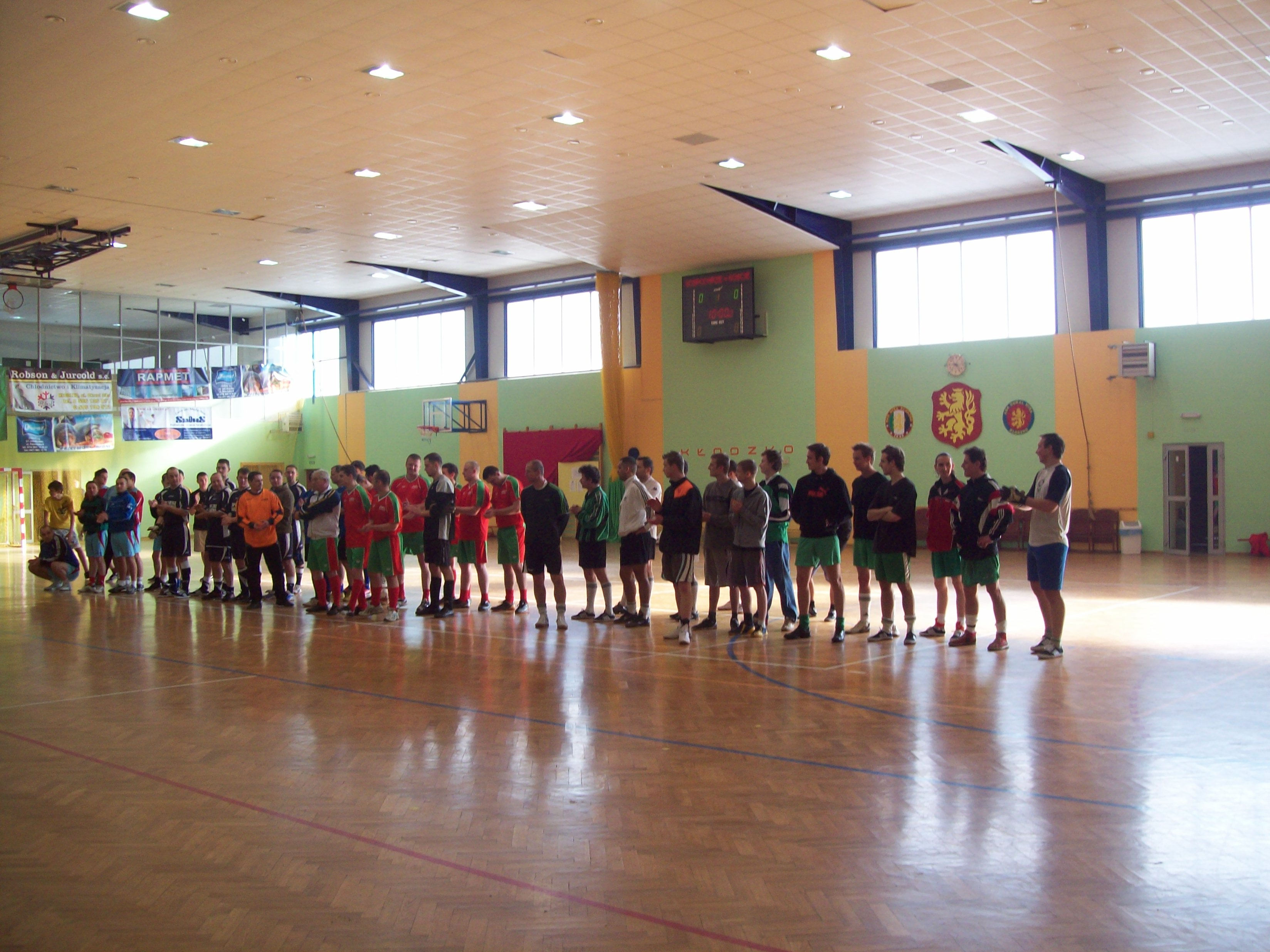 Turniej piłki nożnej o puchar Dyrektora Kłodzkiego Centrum Sportu i Rekreacji z lutego 2010 r.